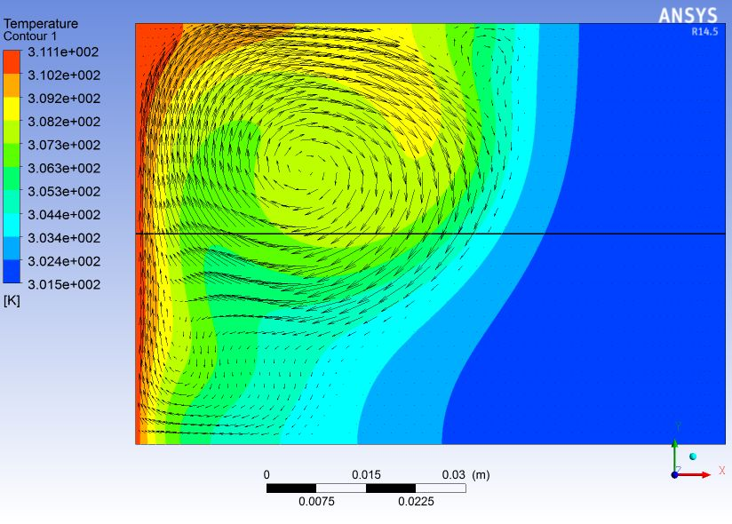 کانتور ذوب